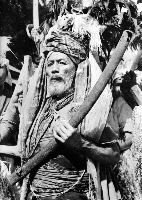 Repronegatief. Kabasaran danser te Tomohon, Noord-Celebes